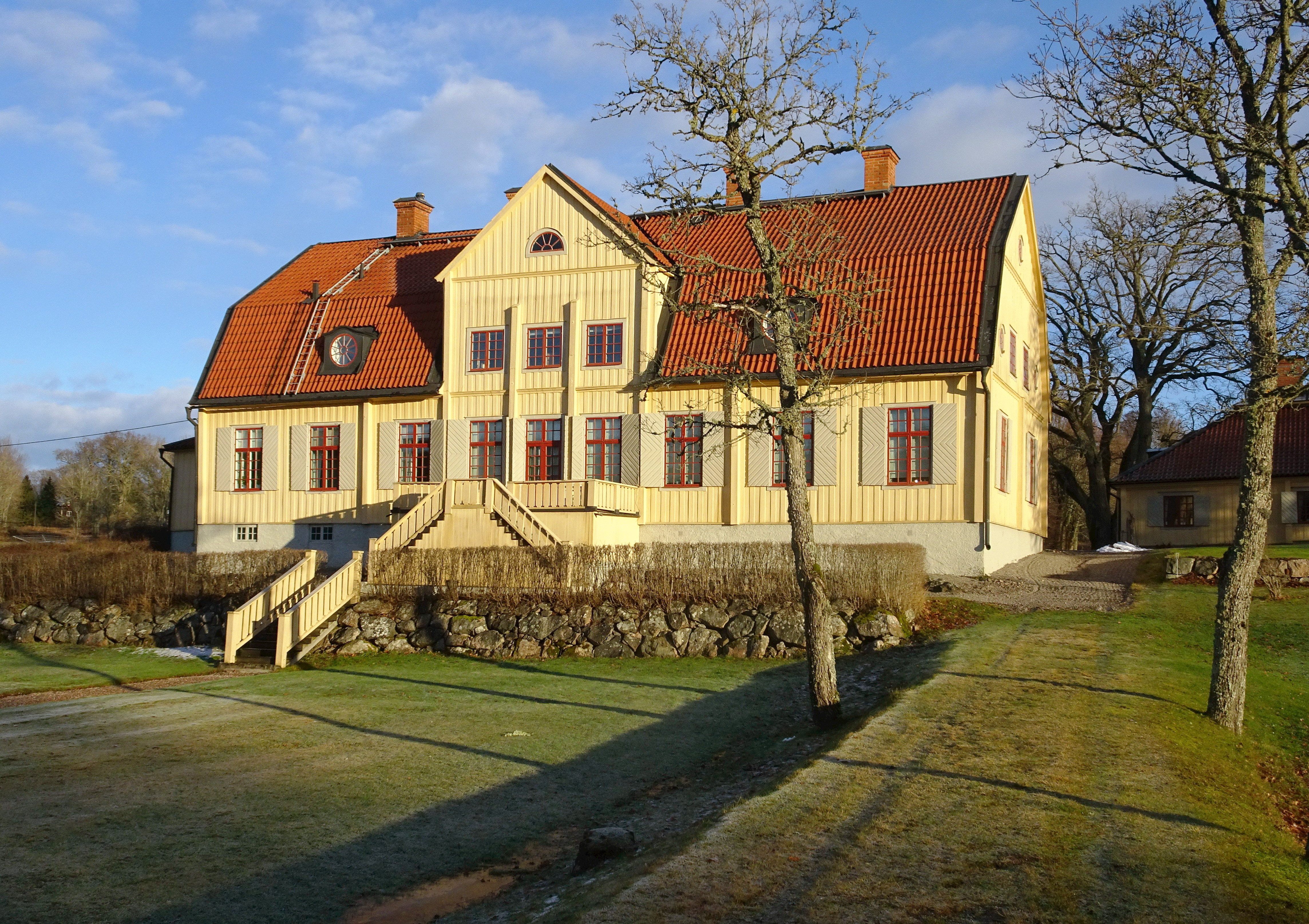 Måstena huvudbyggnad från väst